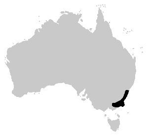 Domaine de distribution de la grenouille Litoria leseuri